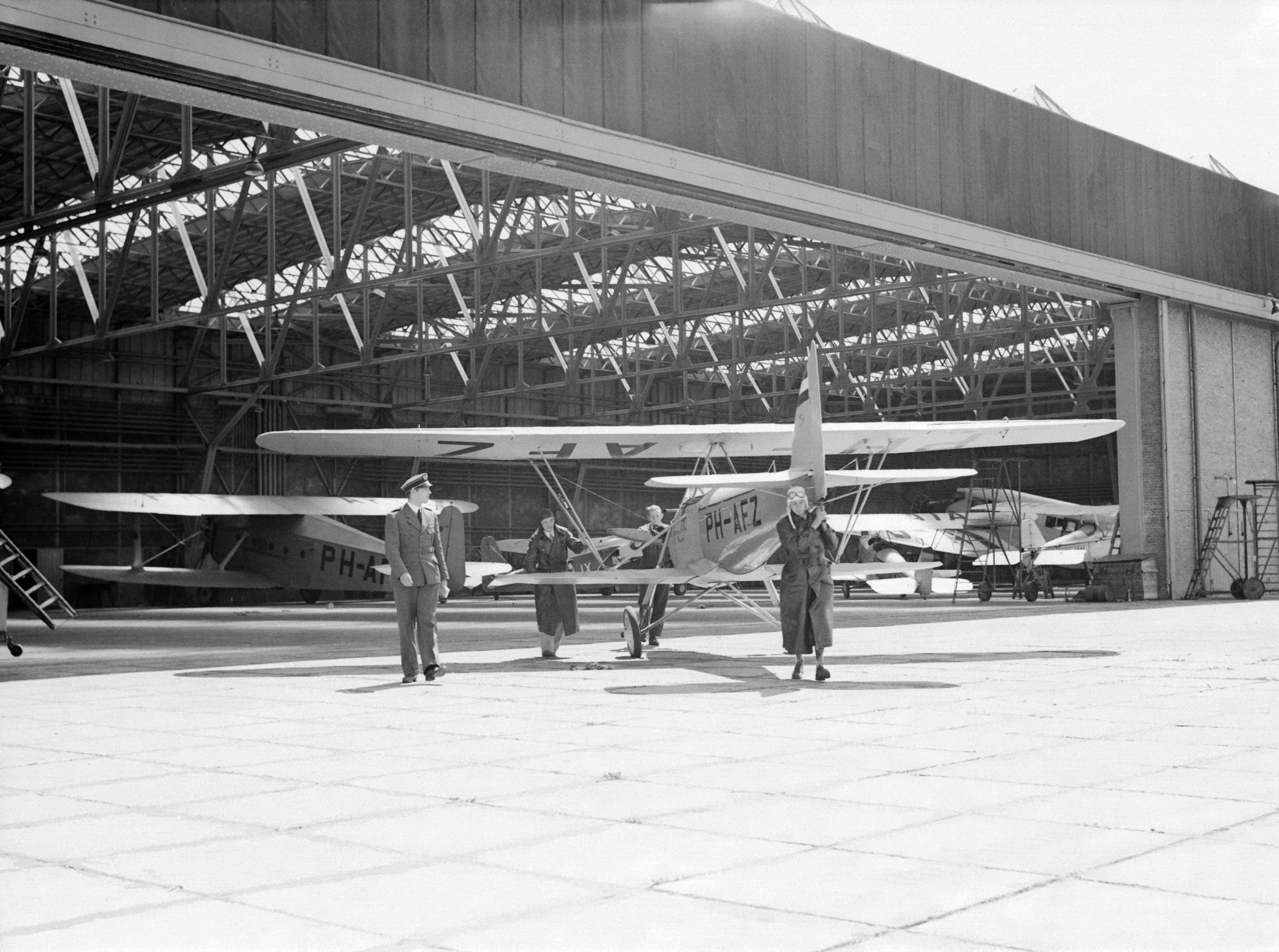 Collectie / Archief : Fotocollectie Van de Poll Reportage / Serie : Nationale Luchtvaartschool Holland Beschrijving : De Pander EF 85 tweedekker registratie PH-AFZ, trainingsvliegtuig van de Nationale Luchtvaartschool te Amsterdam Schiphol wordt door toekomstige piloten de hangar uitgeduwd. Annotatie : Dit vliegtuig is in aanvang in Rotterdam en later in Amsterdam gebruikt Datum : 12 februari 1931 Locatie : Amsterdam, Rotterdam Trefwoorden : leerlingen, piloten, vliegopleidingen, vliegtuigen Fotograaf : Poll, Willem van de Auteursrechthebbende : Nationaal Archief Materiaalsoort : Negatief (zwart/wit) Nummer archiefinventaris : bekijk toegang 2.24.14.02 Bestanddeelnummer : 255-8620